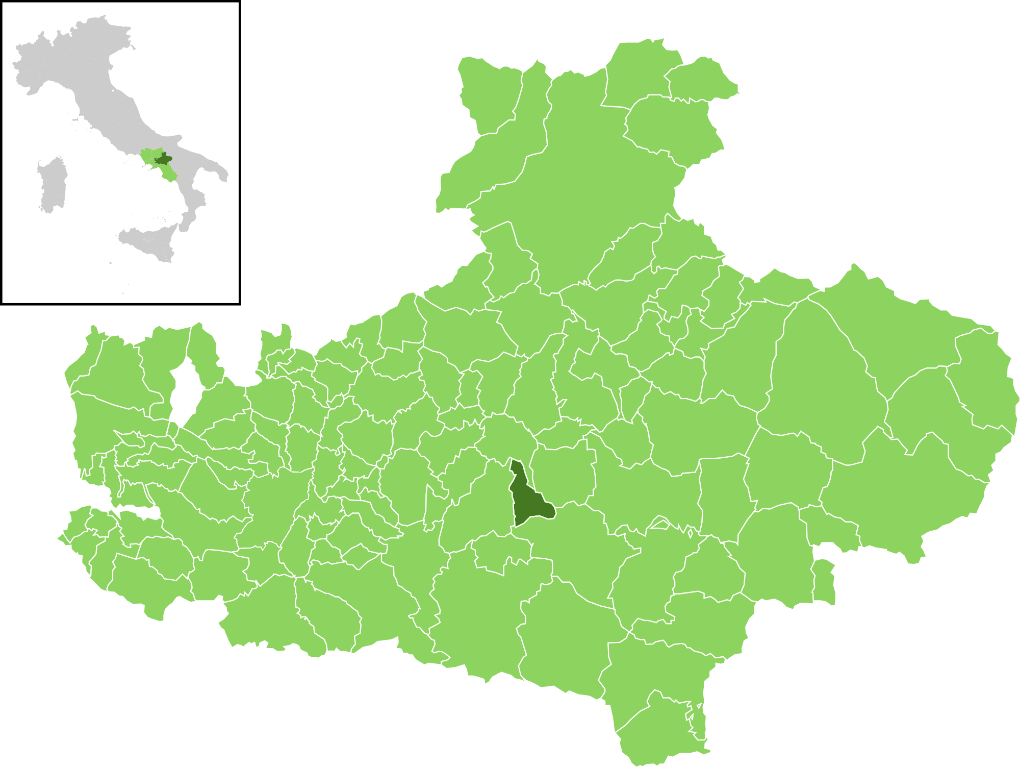 Il comune all'interno della provincia di Avellino